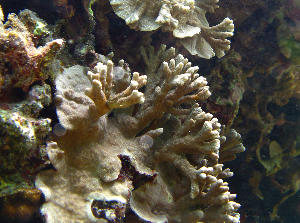 Corail Porites rus à la Réunion.